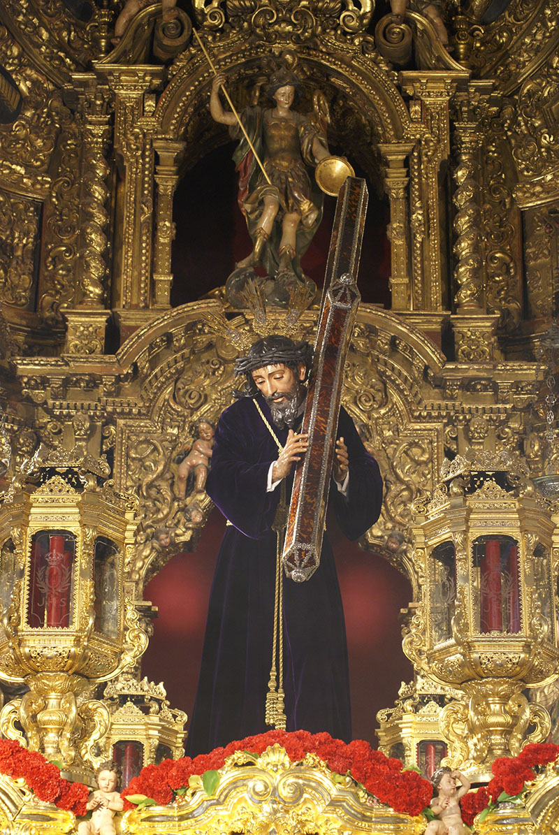 Fotografia realizada por Manuel Francisco Álvarez Ruiz.